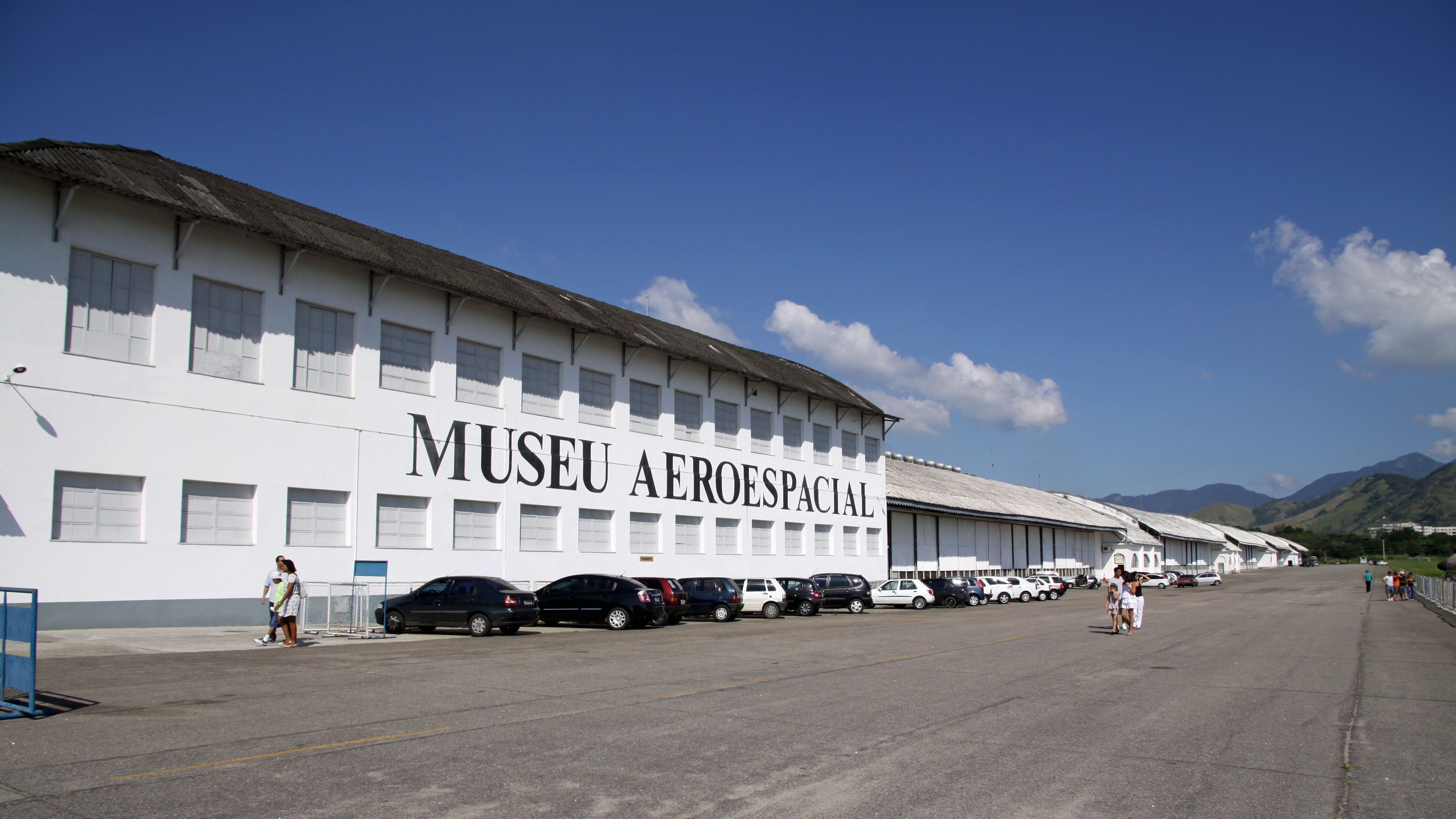 Museu Aeroespacial no Campo dos Afonsos